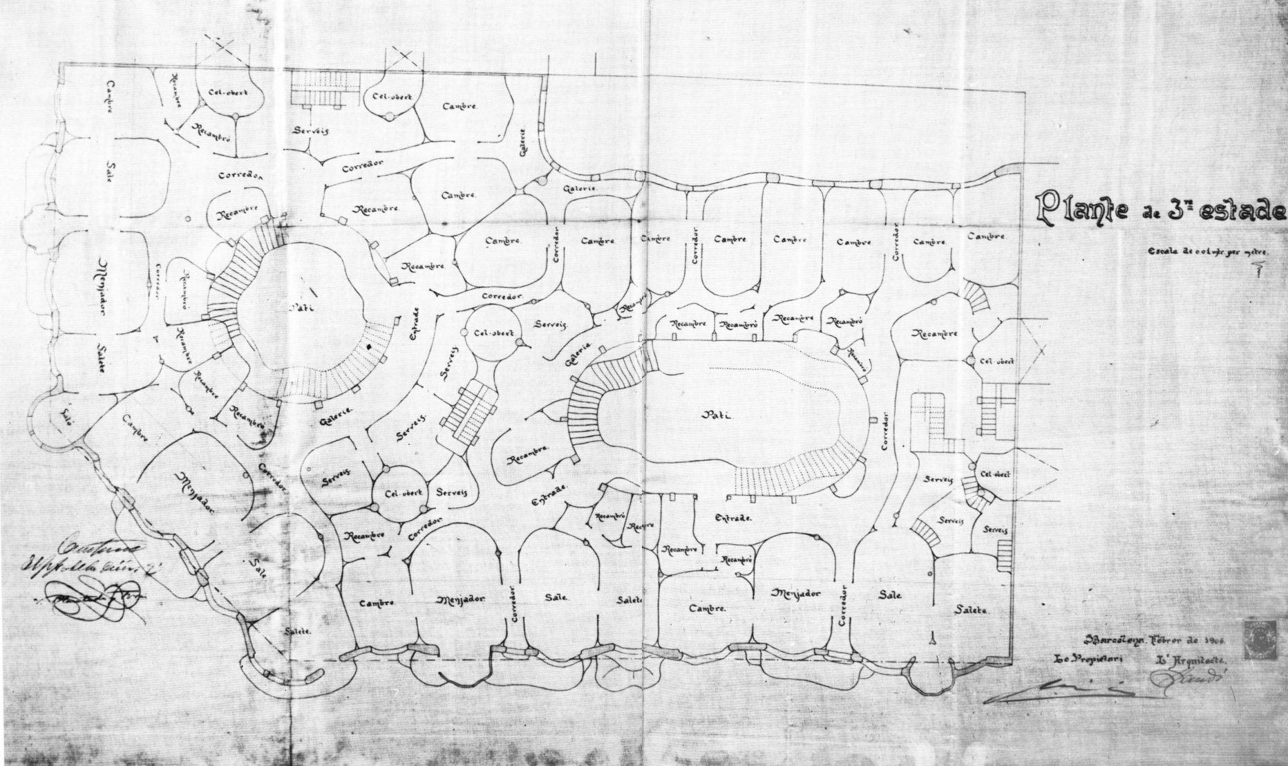 Plano de la tercera planta de la Casa Milà.